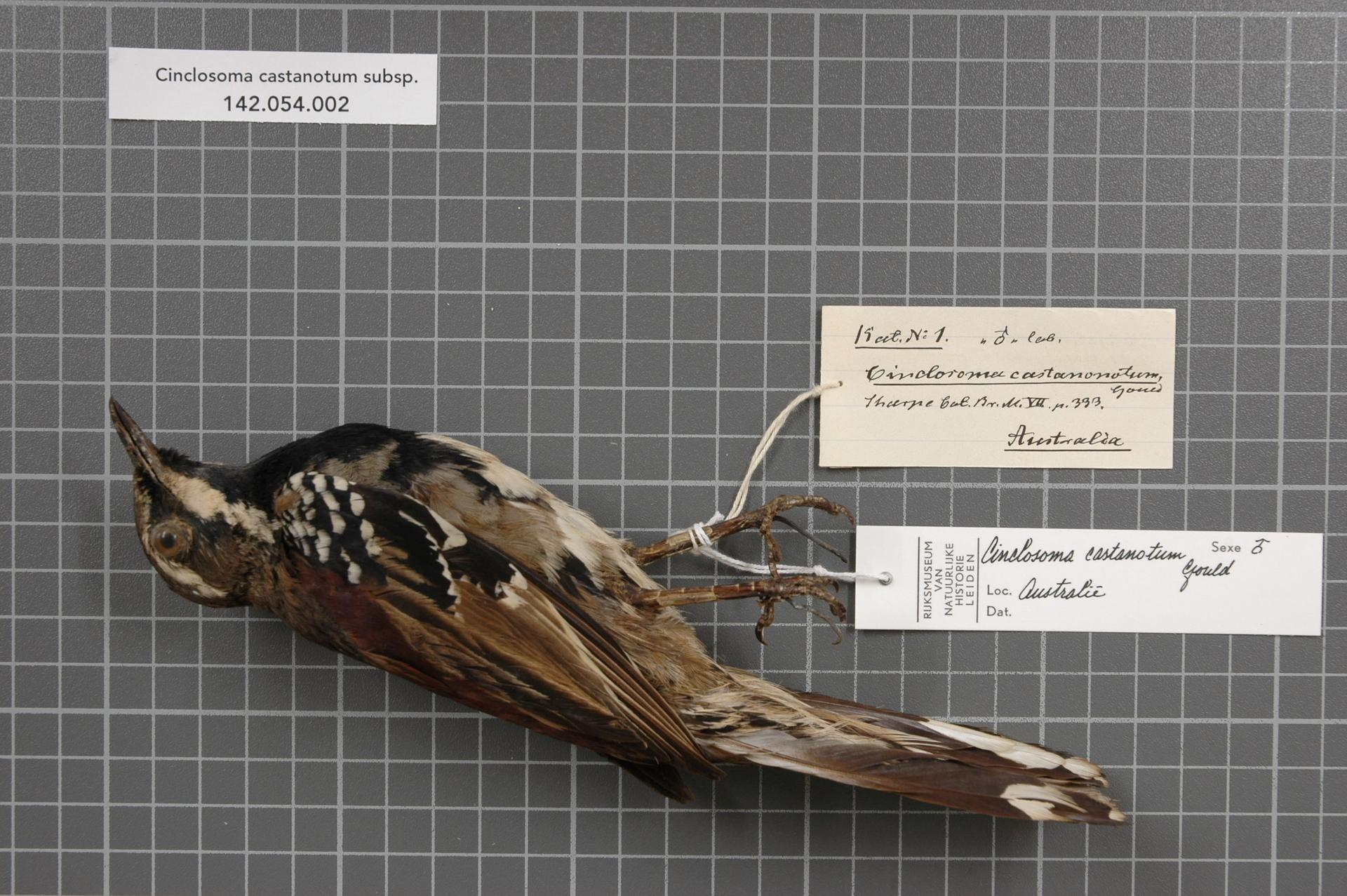 Cinclosoma castanotum subsp.